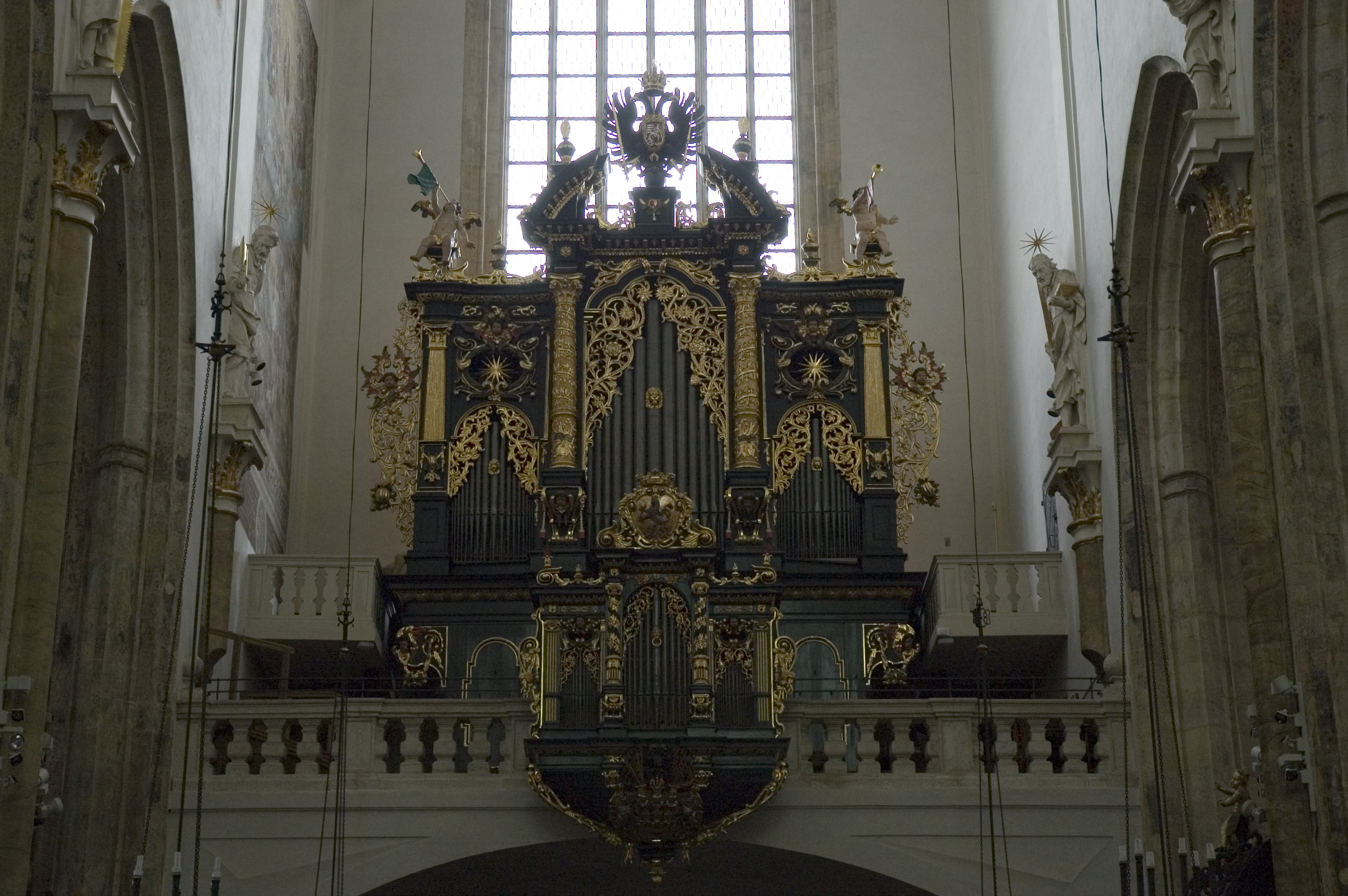 Praha, Týnský chrám